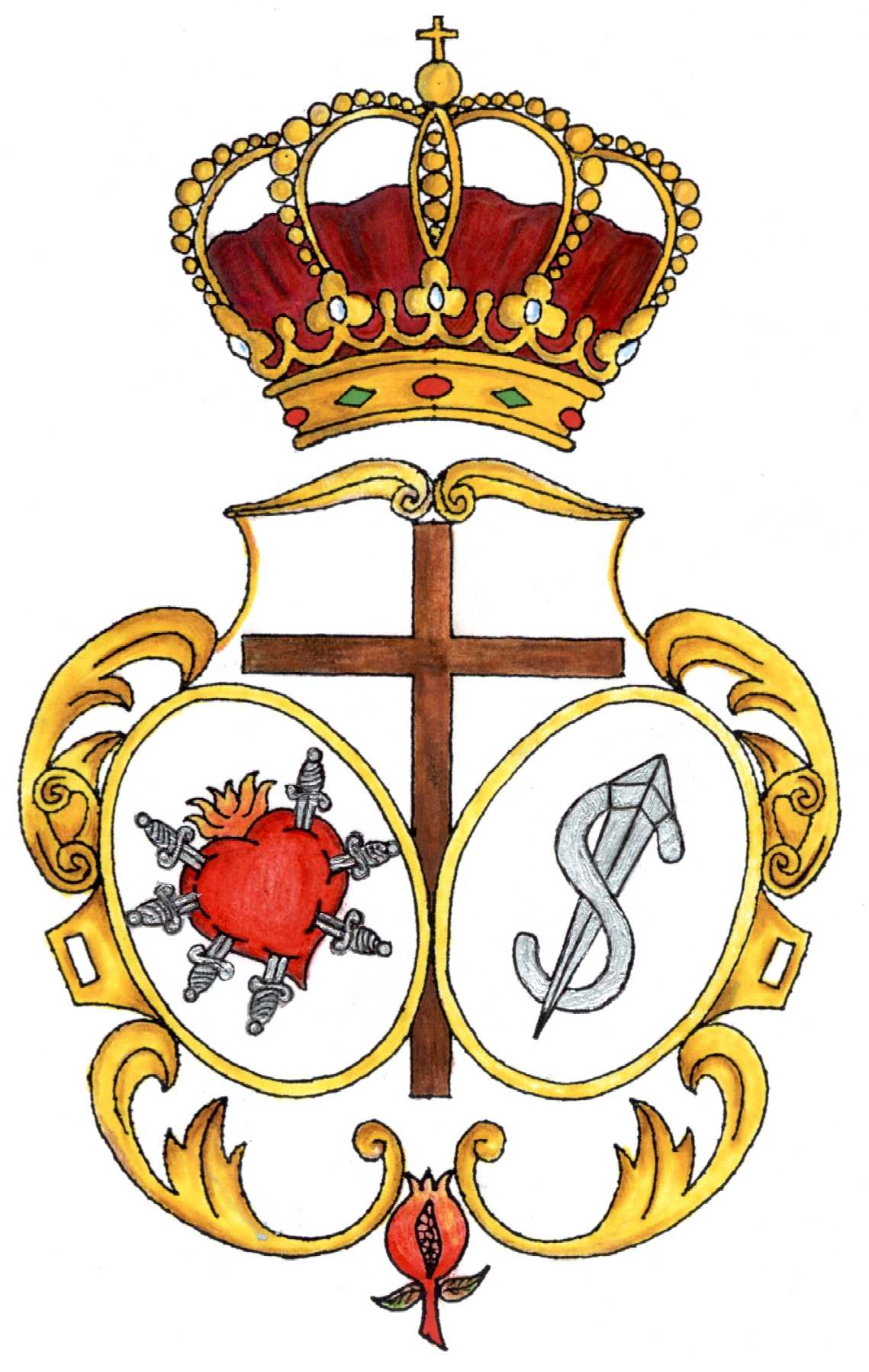 Escudo de la Hermandad de los Dolores de La Puebla del Río (Sevilla).